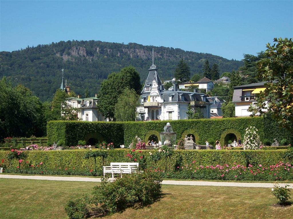 Gönnneranlage Baden-Baden